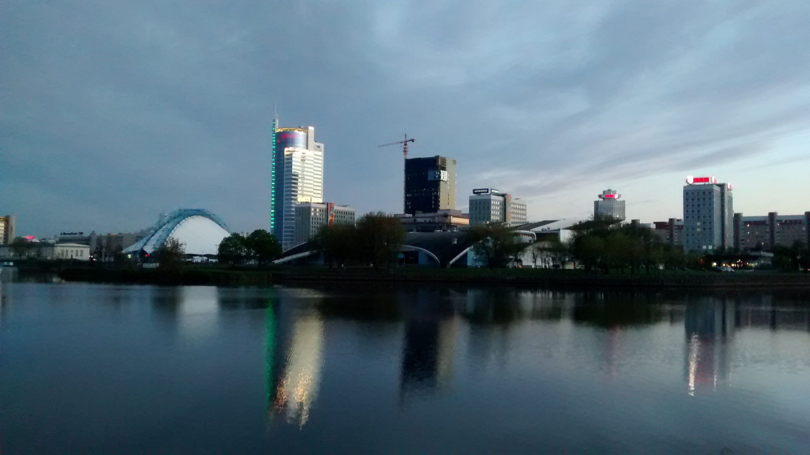 вид на діловий район Мінська